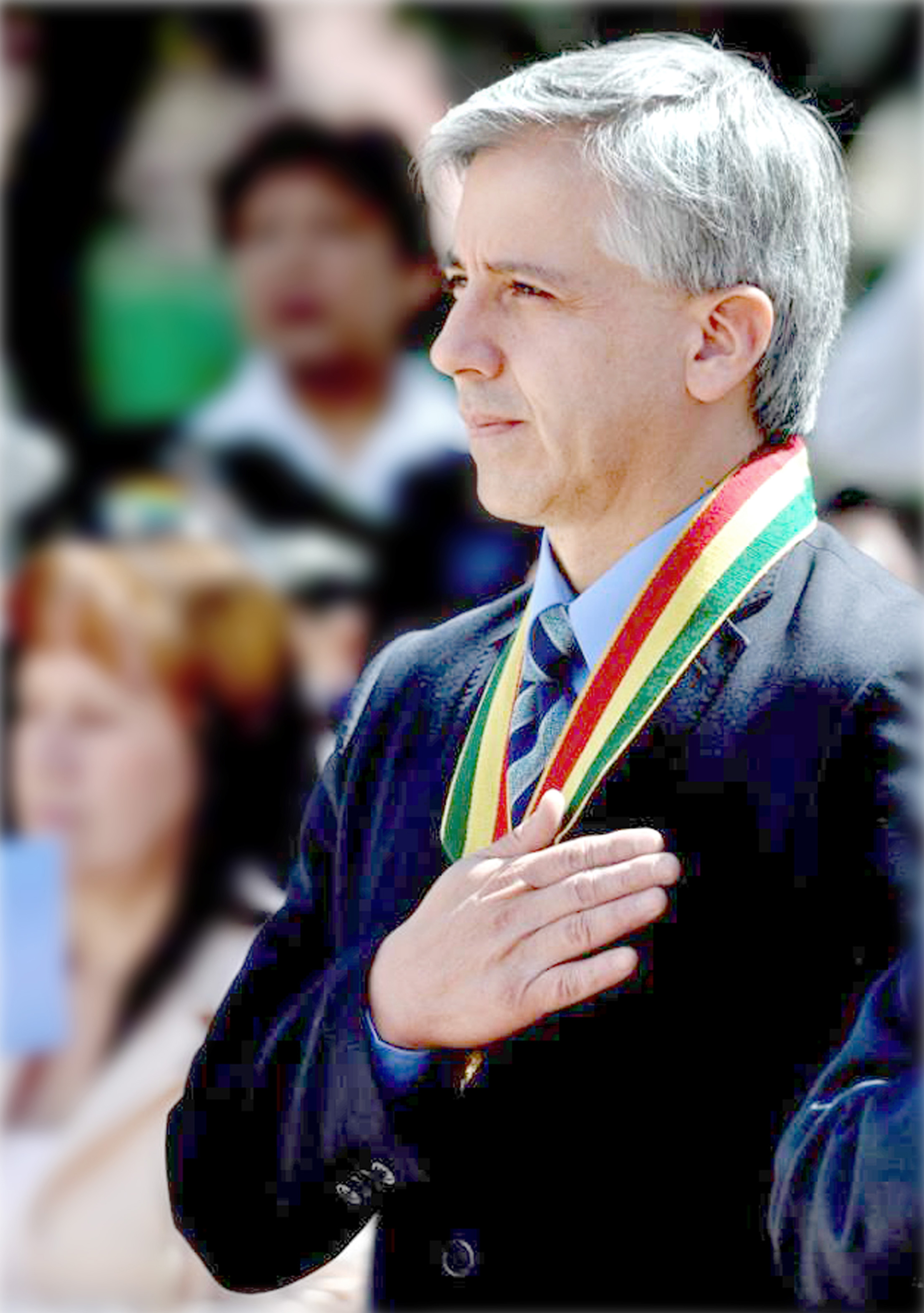 Primer Vicepresidente del Estado Plurinacional de Bolivia.